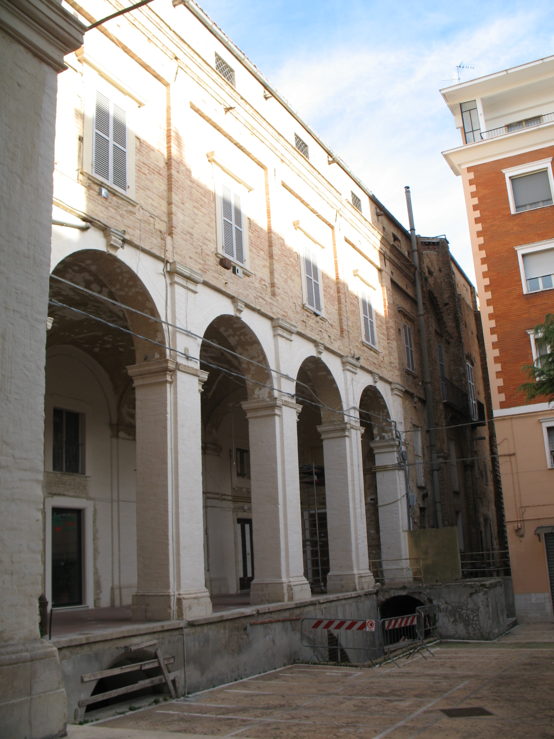 Ala del Palazzo Martinetti-Bianchi di Chieti